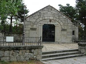 Ermita de la Virgen de la Soledad en El Espinar (Segovia) Autor: Jmorcillo. Fotografía de libre distribución